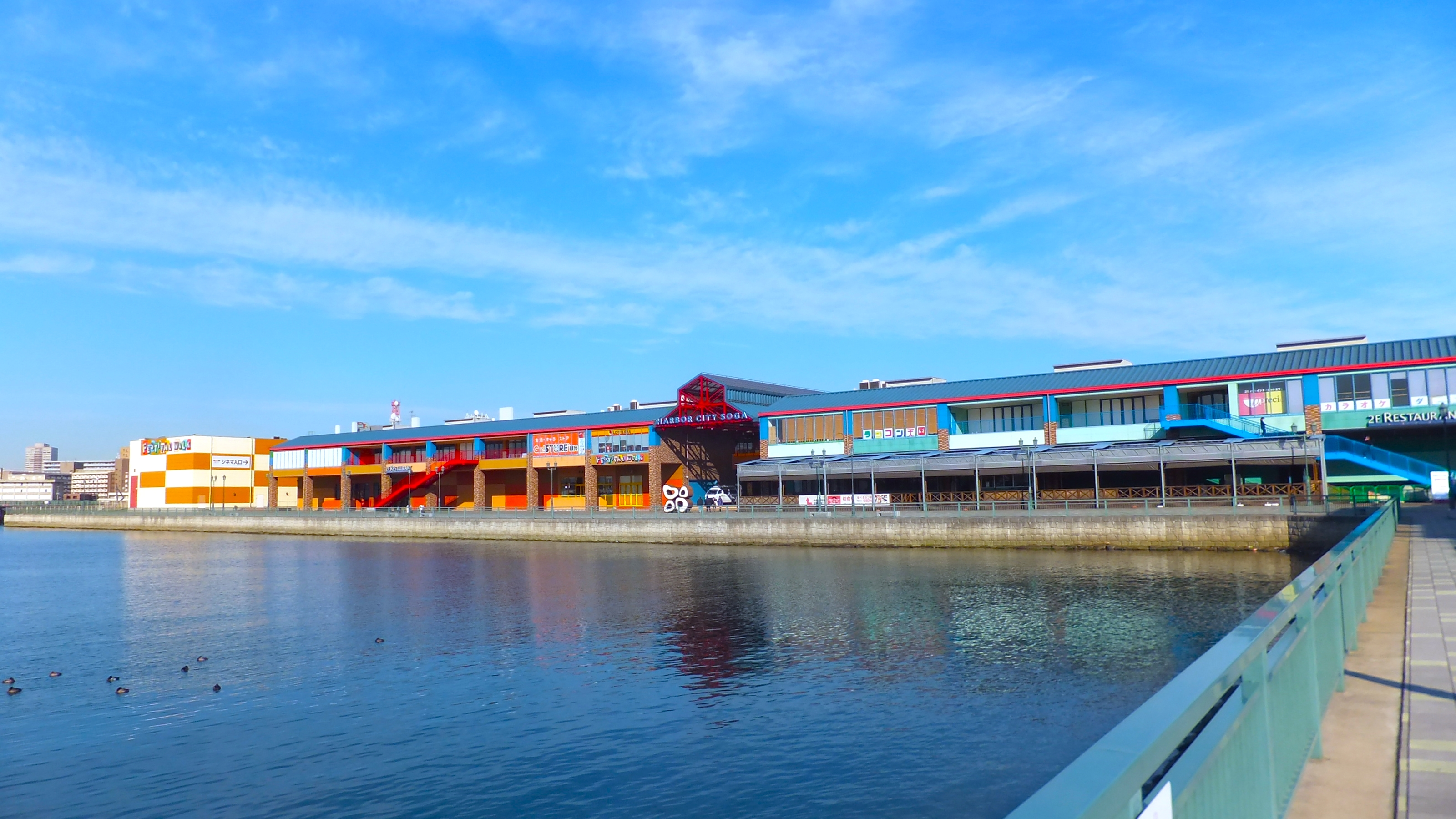 千葉市中央区の蘇我地区にある再開発地区・ショッピングモールハーバーシティ蘇我・フェスティバルウォーク。